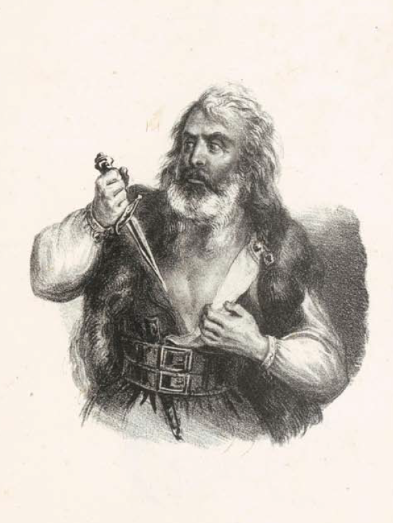 Dal Dizionario biografico degli uomini illustri di Sardegna di Pasquale Tola, 1837